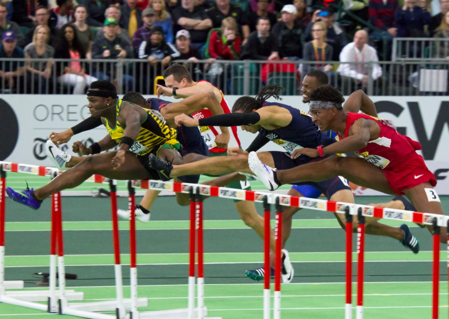 5203 finale 60mH